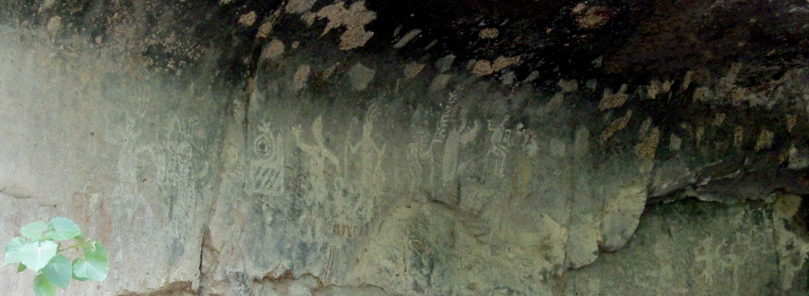 Pinturas rupestres El Tepozán, Calvillo, Ags. México